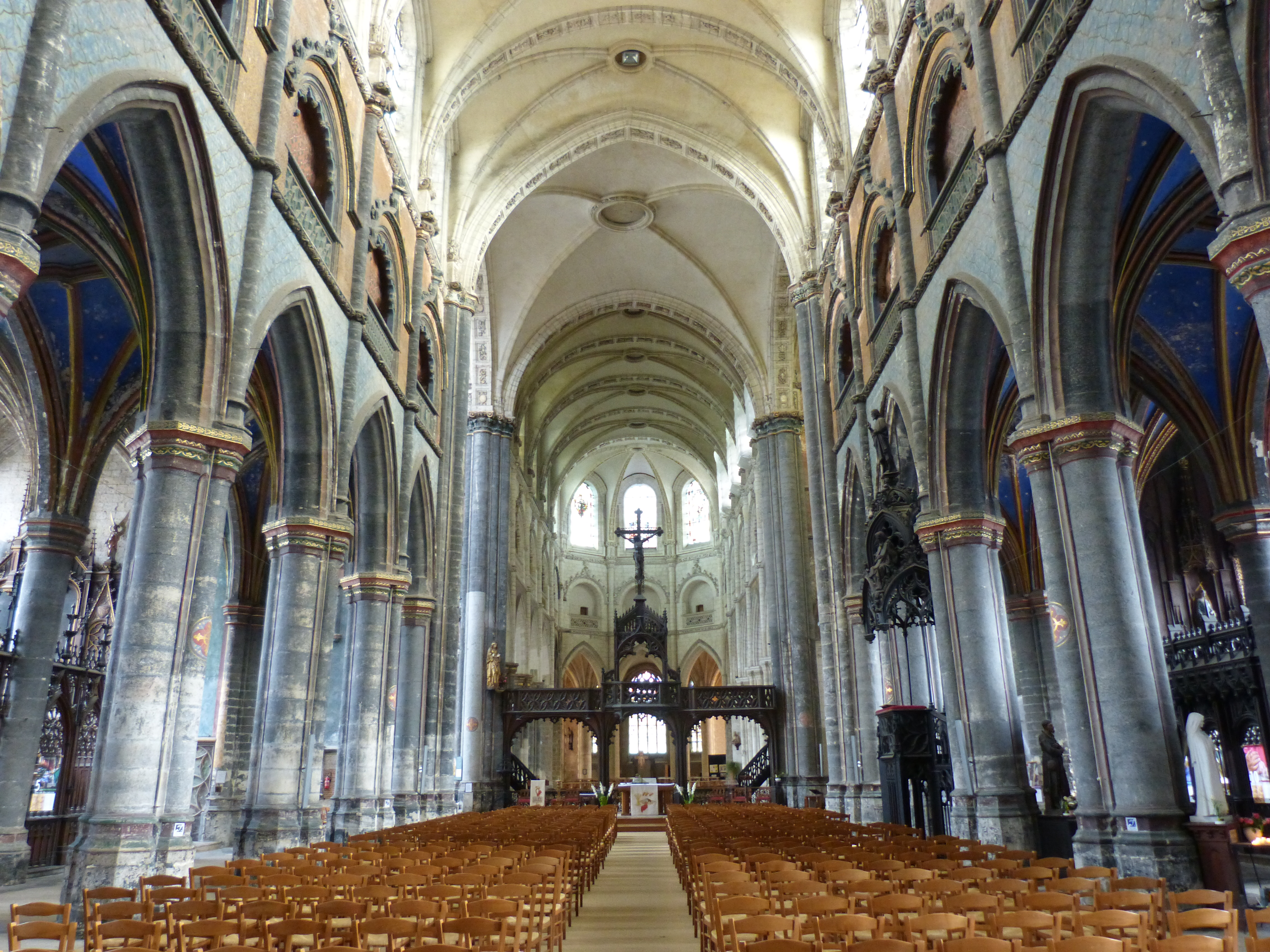 Nef de la collégiale d'Aire-sur-la-Lys